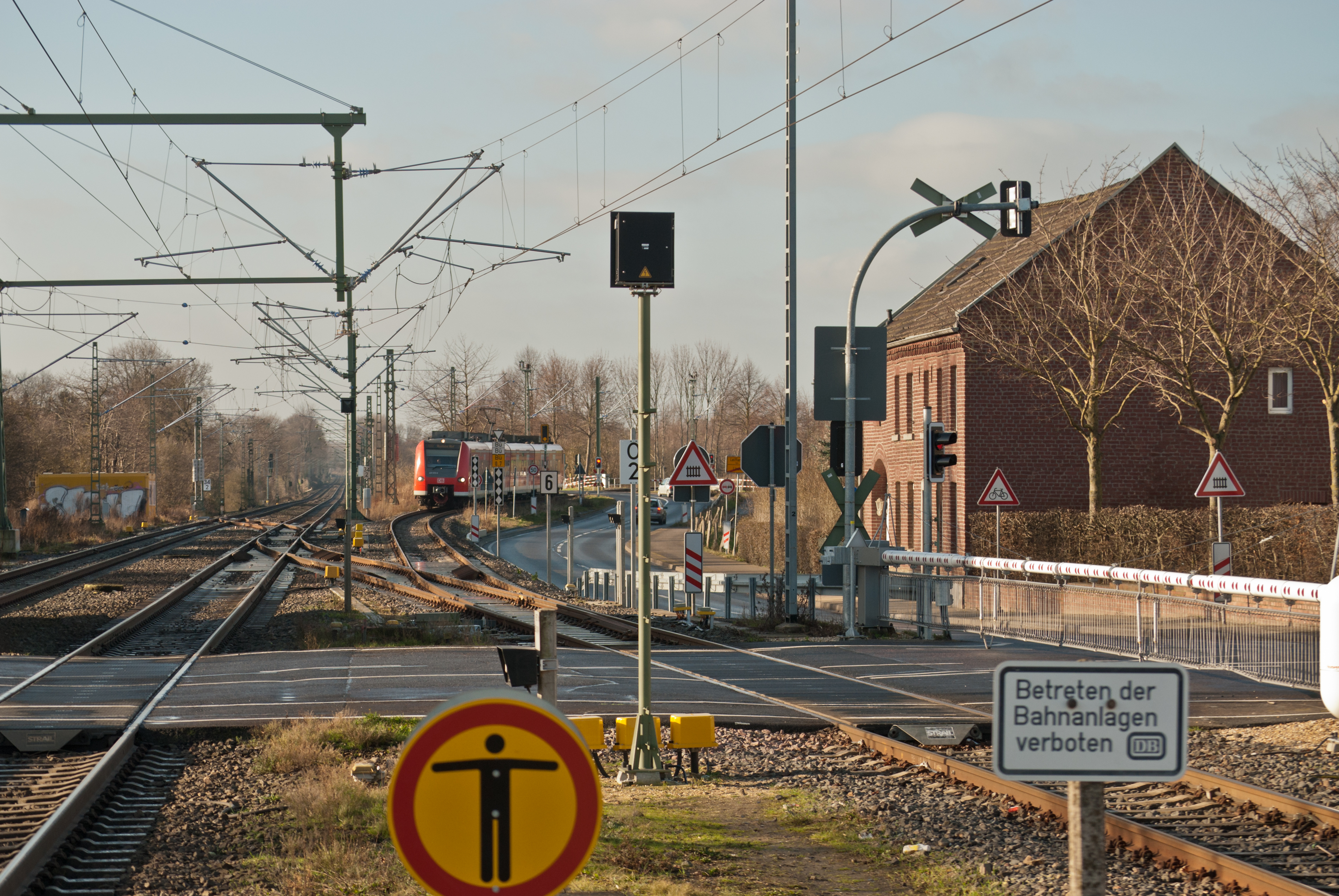 Von Heinsberg kommende Regionalbahn RB 33 fährt in Lindern ein